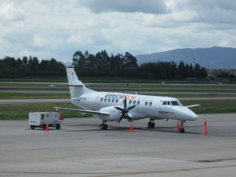 Jestream 41 de la aerolínea colombiana EasyFly en el Aeropuerto Internacional El Dorado de Bogotá.